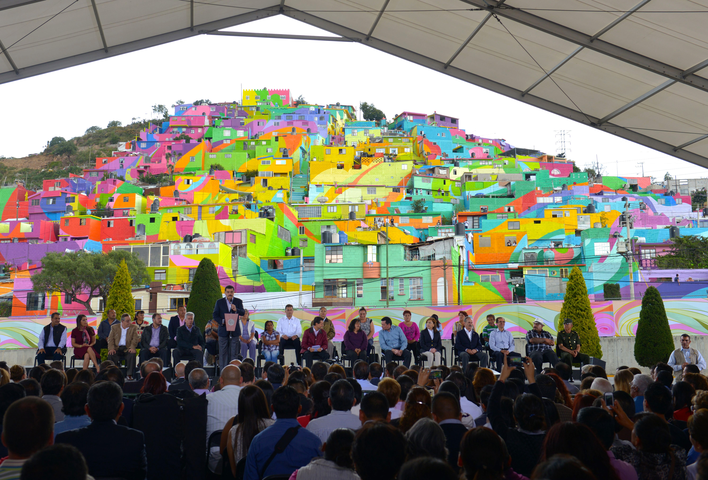 Inauguración del Macromural “Pachuca se Pinta”. Pachuca, Hidalgo. 31 de agosto de 2015.